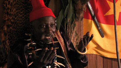 photo prise au Cameroun durant le tournage du documentaire "Les Brumes du Manengouba", du chef Nsume de Nyassoso en 2007.